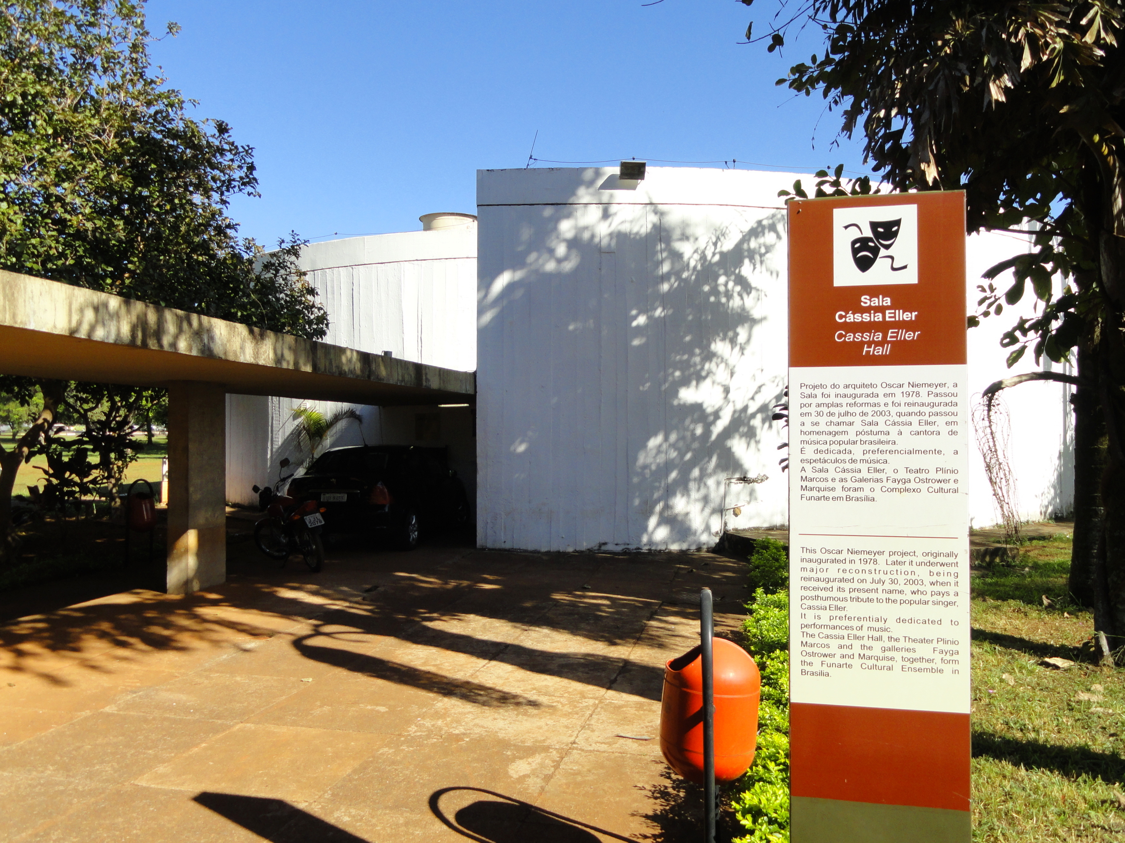 Sala Cássia Eller, Brasília, Brazil.